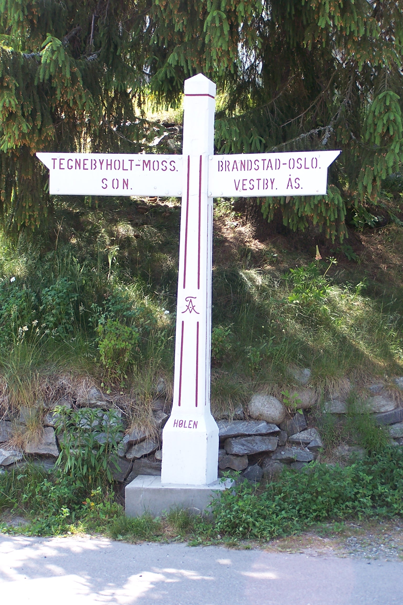 Hølen, roadsign from c. 1928